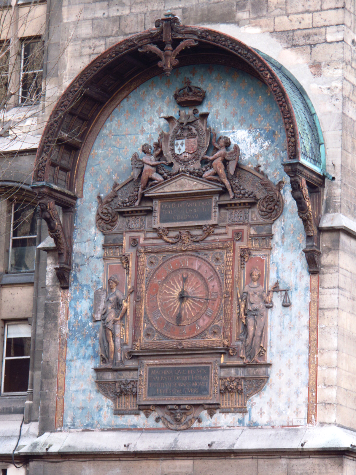 Germain Pilon: Horloge de la Tour de l’Horloge, 1585, Paris, Palais de la Cité, Boulevard du Palais.